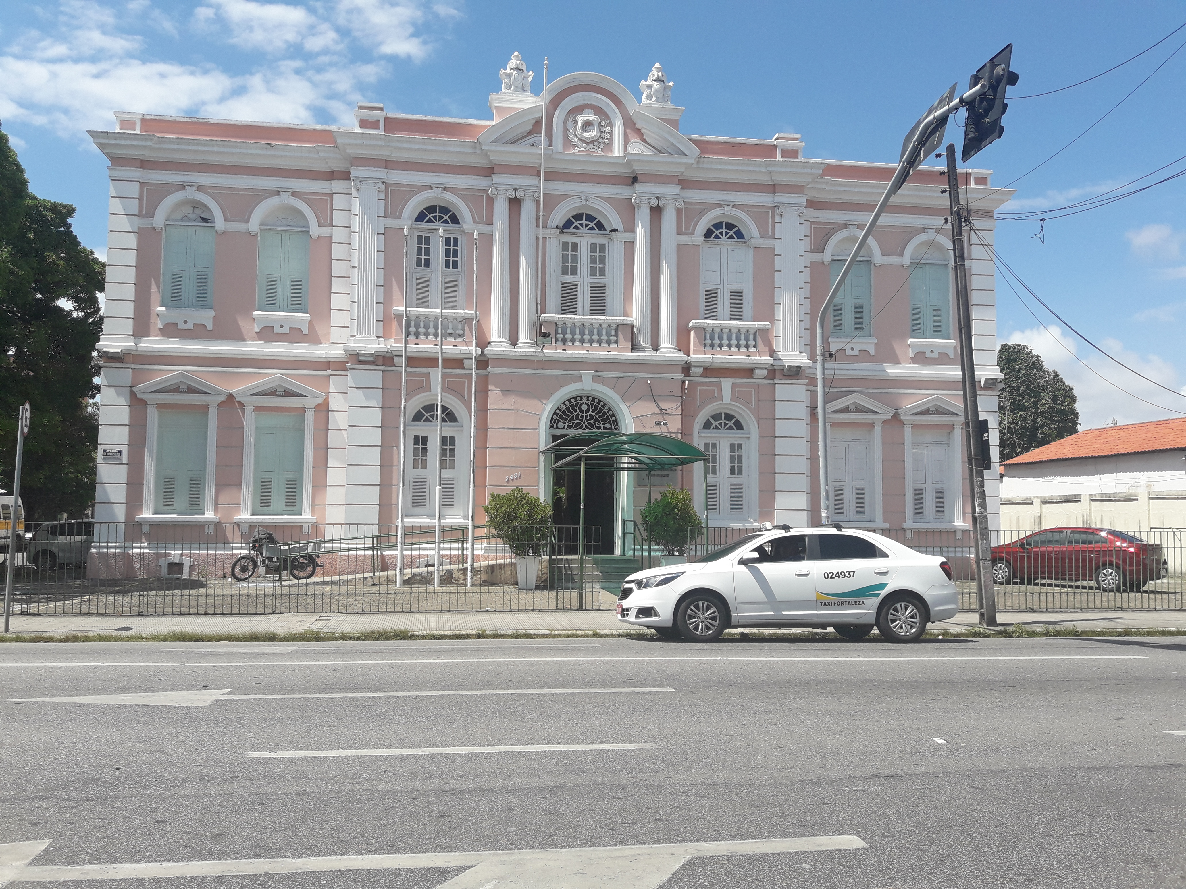 Área Externa da FEAAC